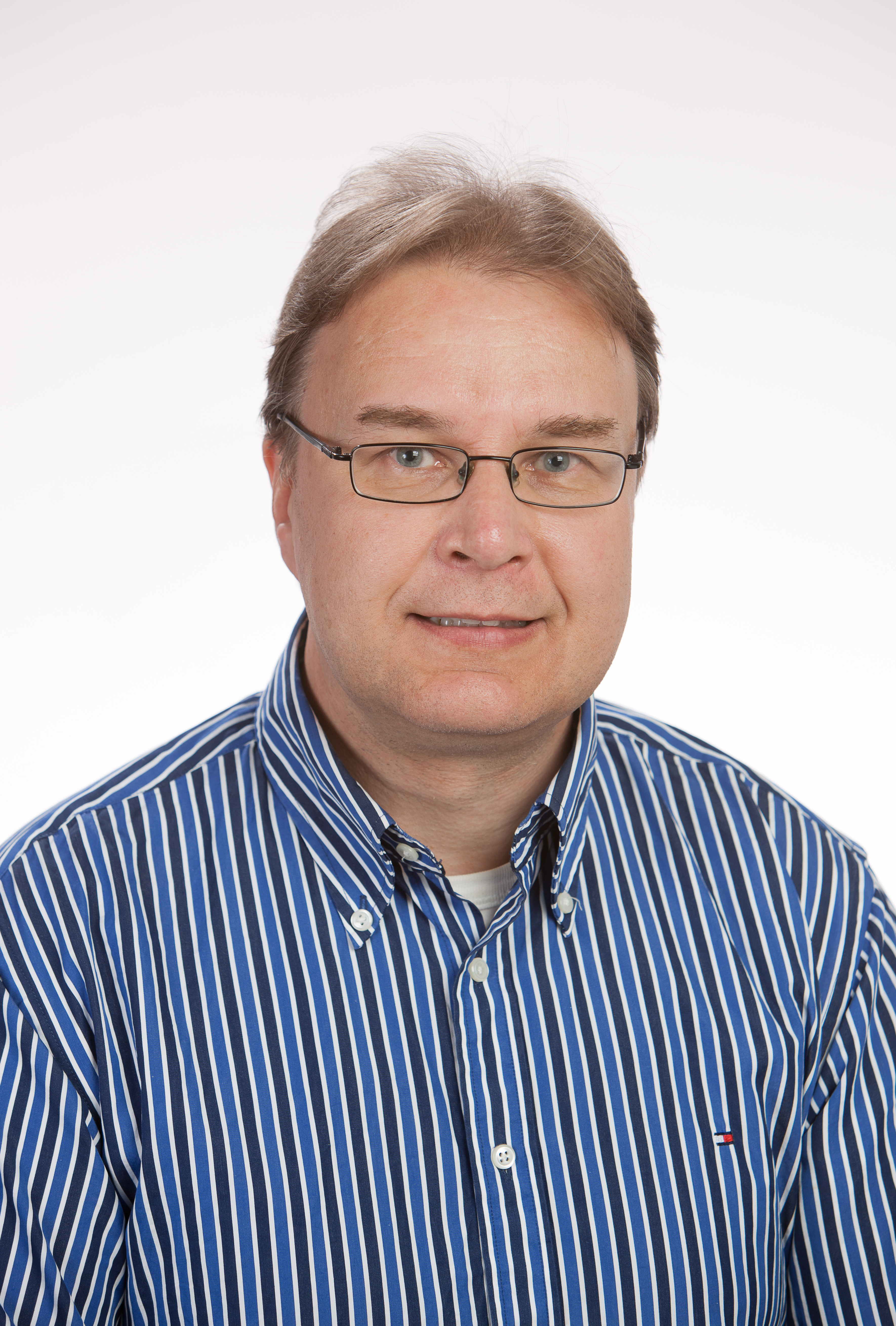 TÜ meditsiinitehnoloogia professor Jyrki Tapio Heinämäki.